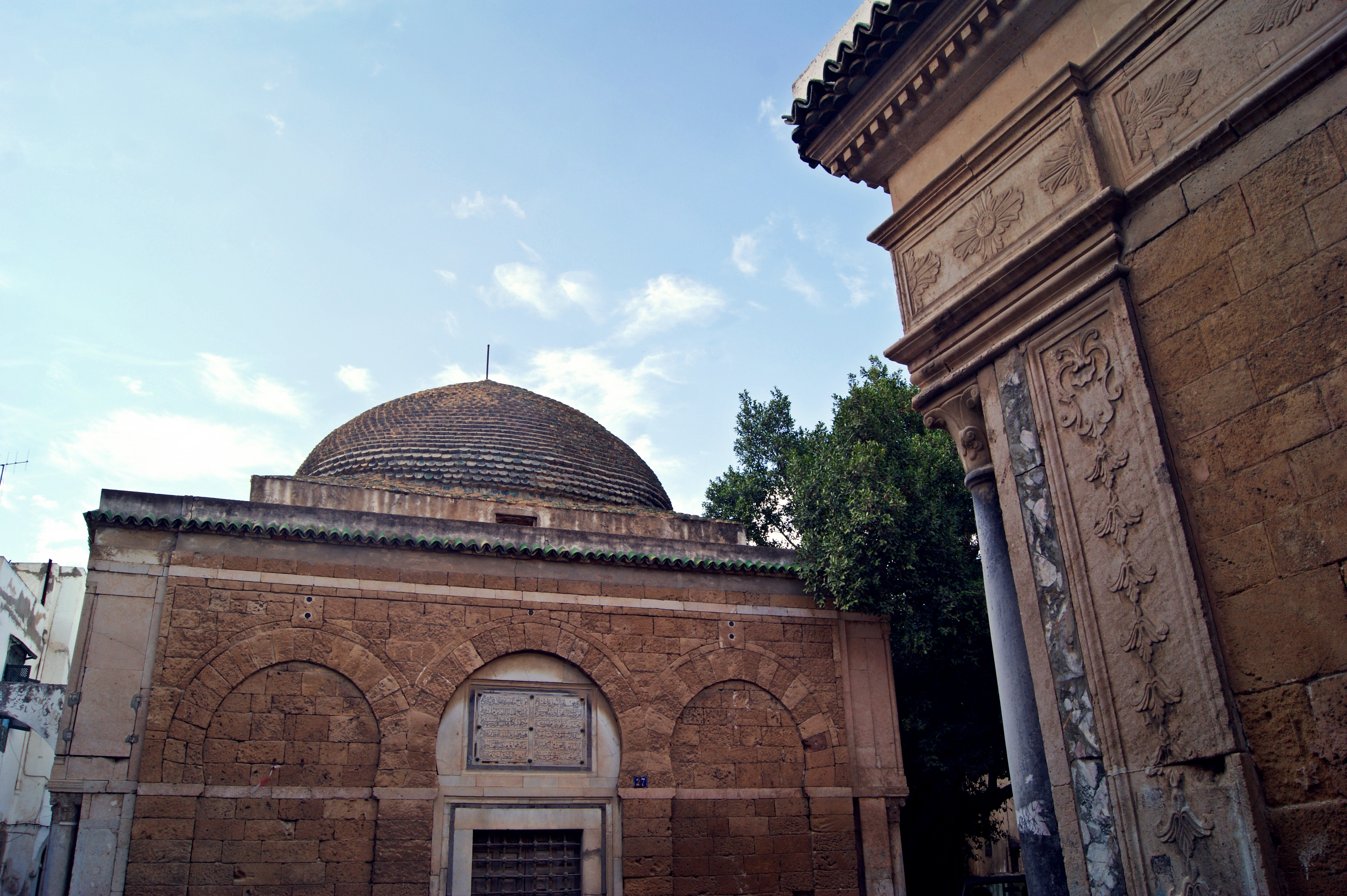 Tourbet El Bey